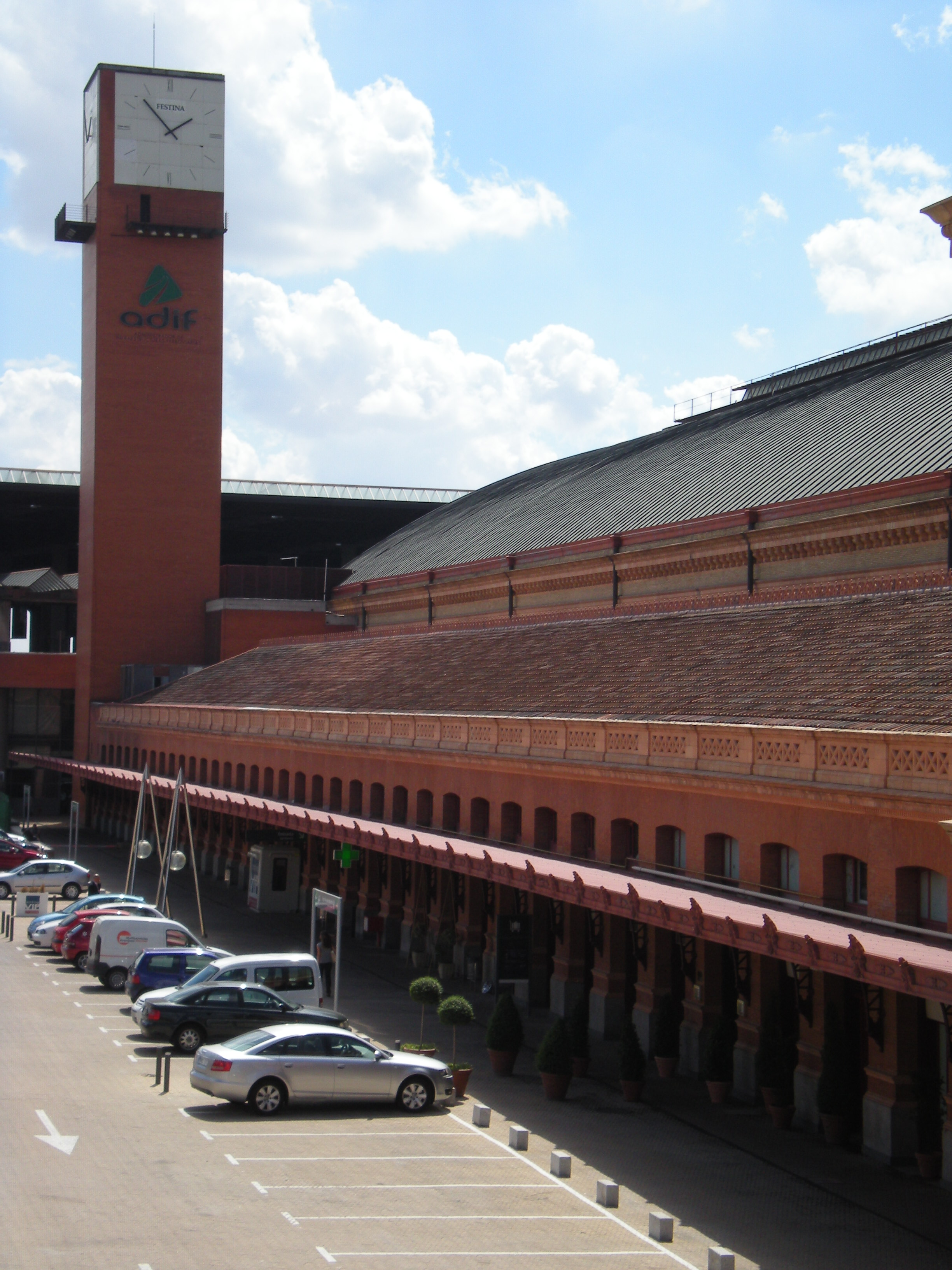 Estación de Atocha. Madrid. Comunidad de Madrid. España